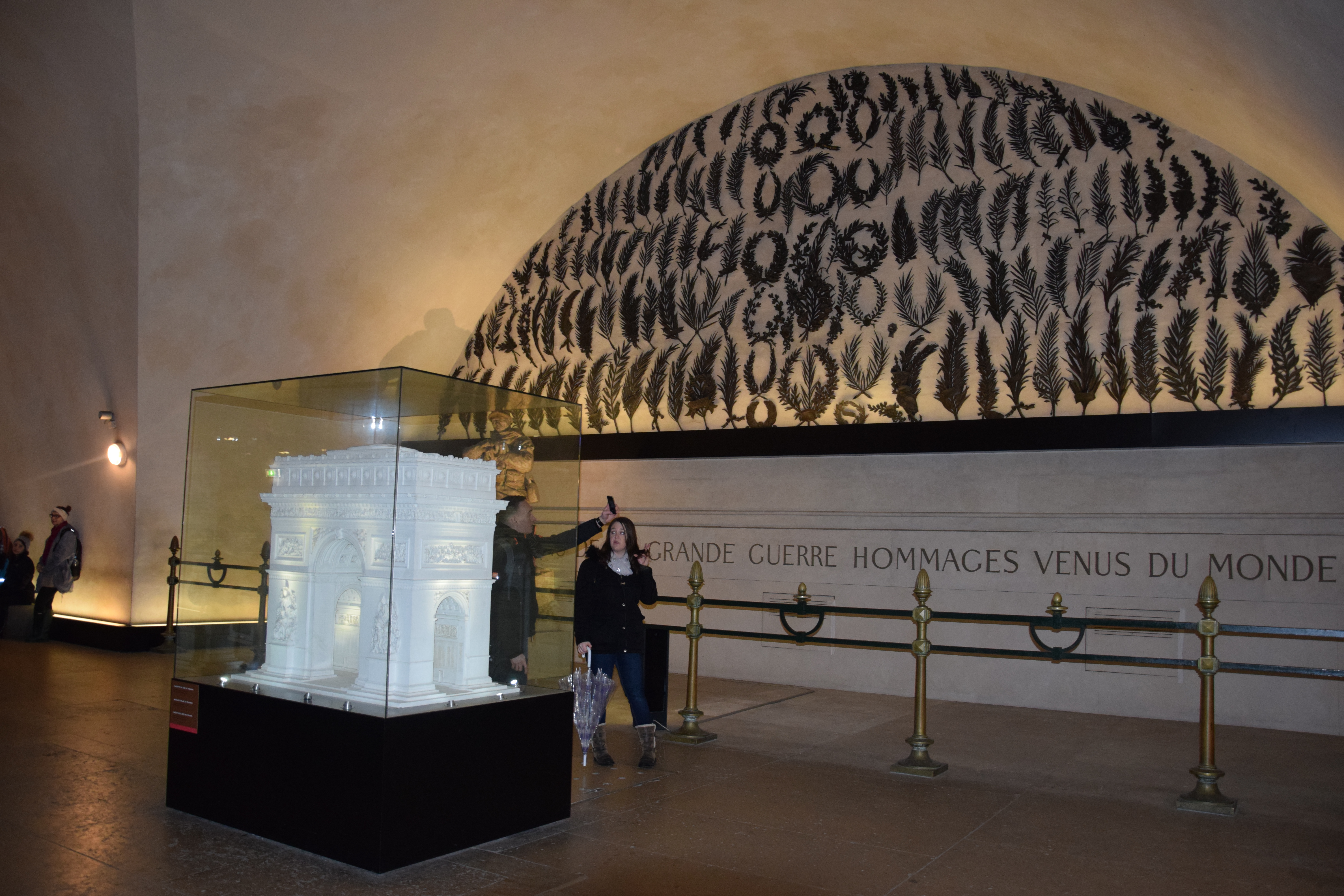 Interior of Arc de Triomphe de l'Étoile